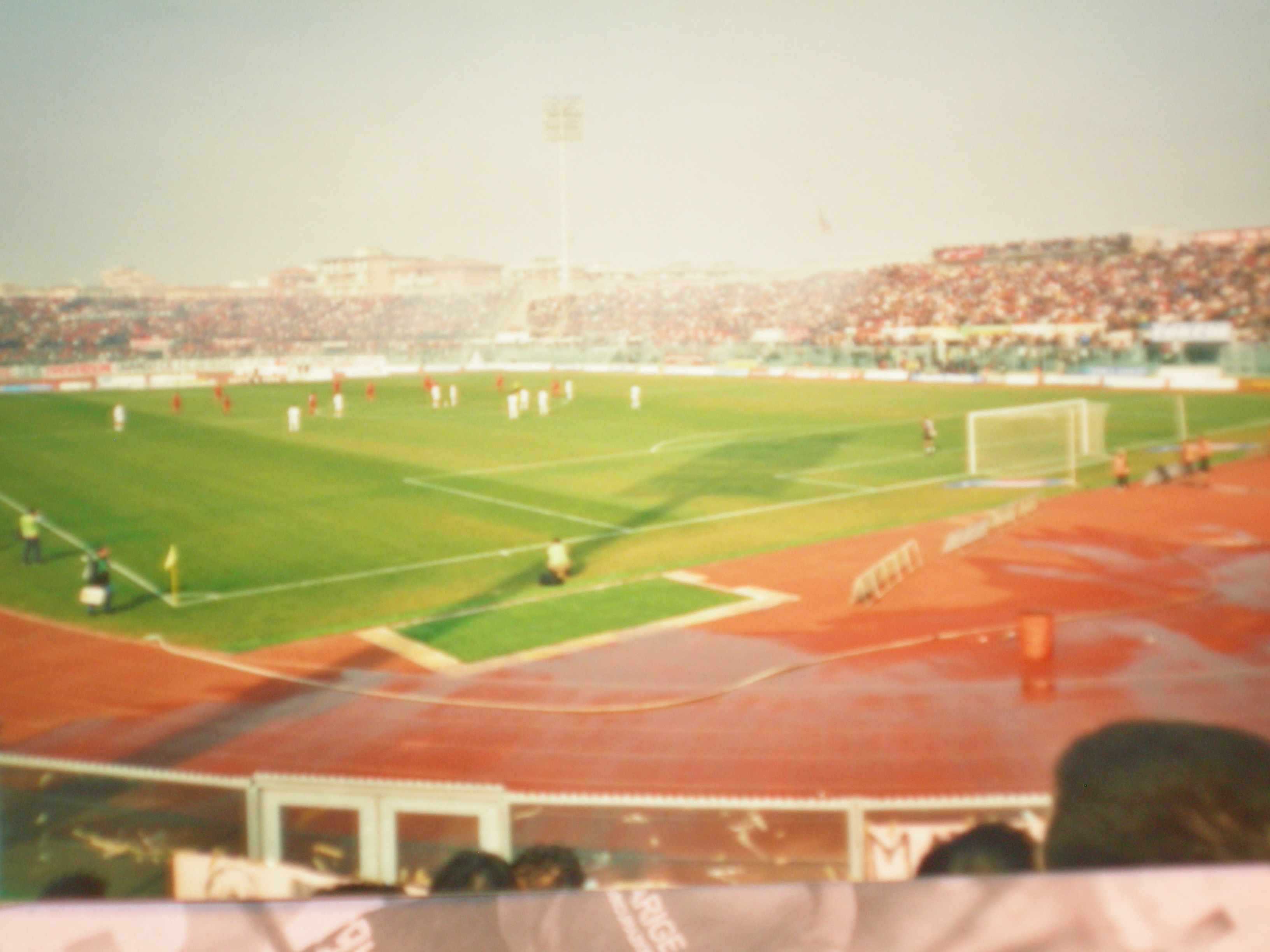 Stadio Armando Picchi, Livorno (Livorno vs Palermo, Serie B 2003-04)